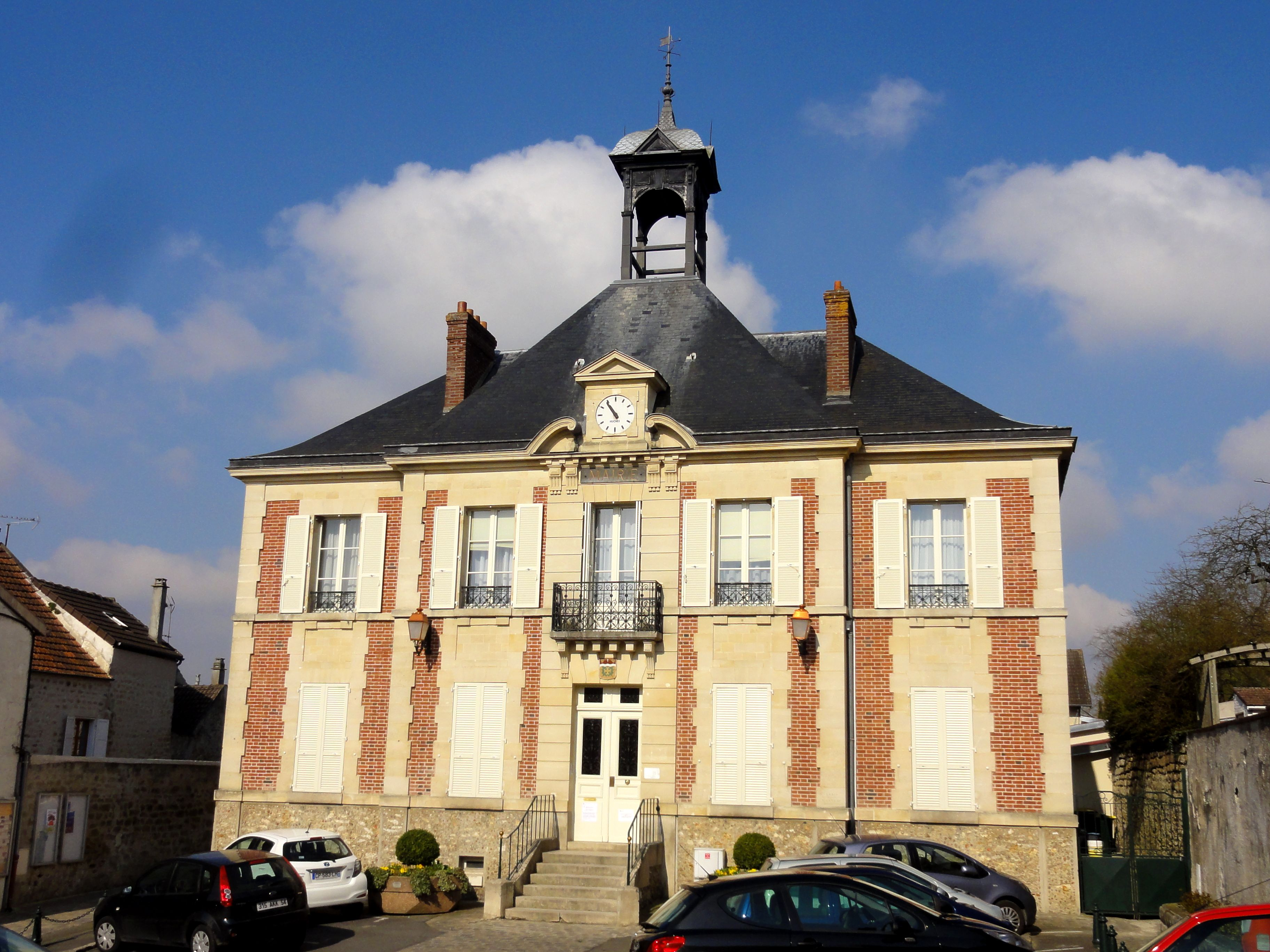 Mairie, rue de la République.